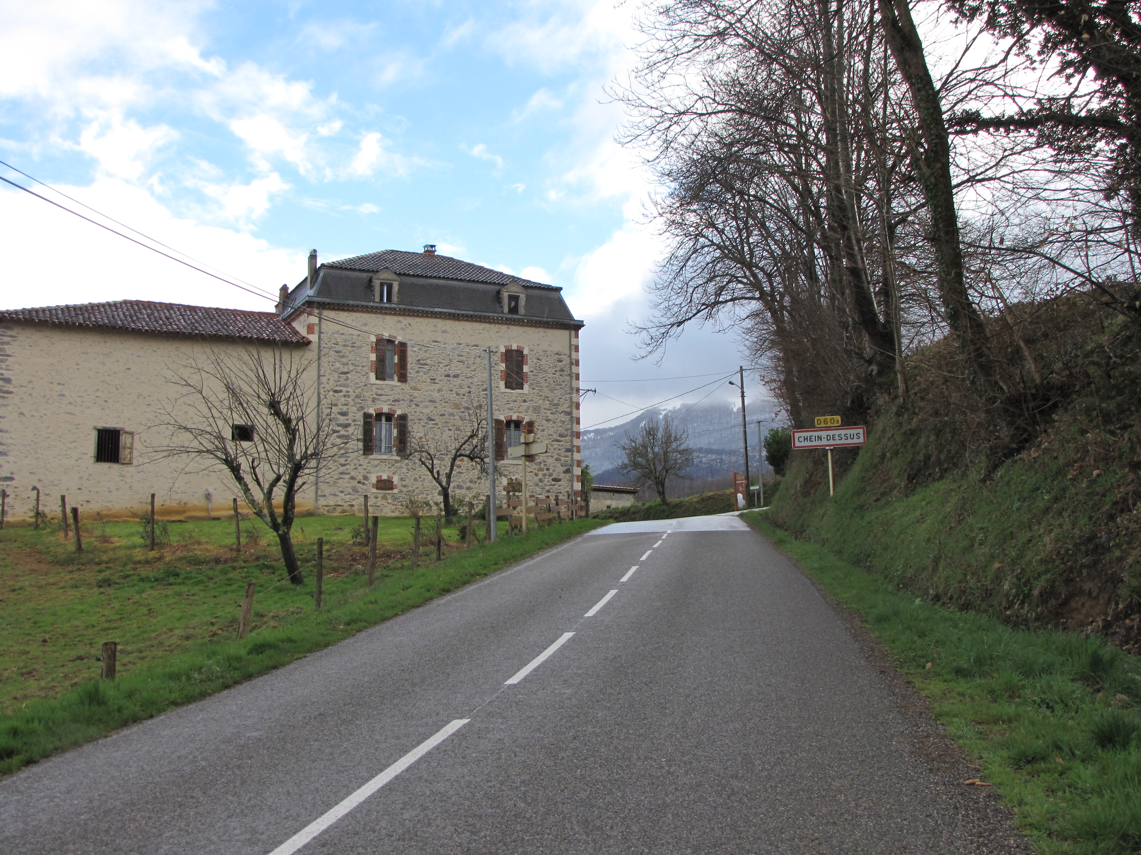 Chein-Dessus